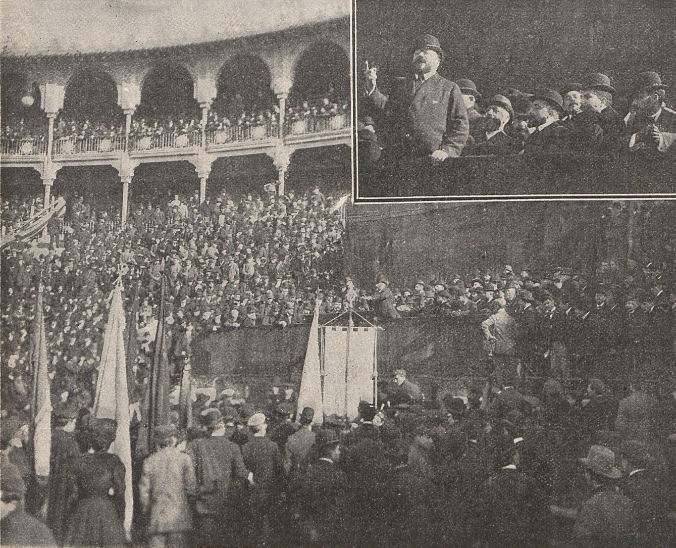 Mitin de Juan Vazquez de Mella en Barcelona